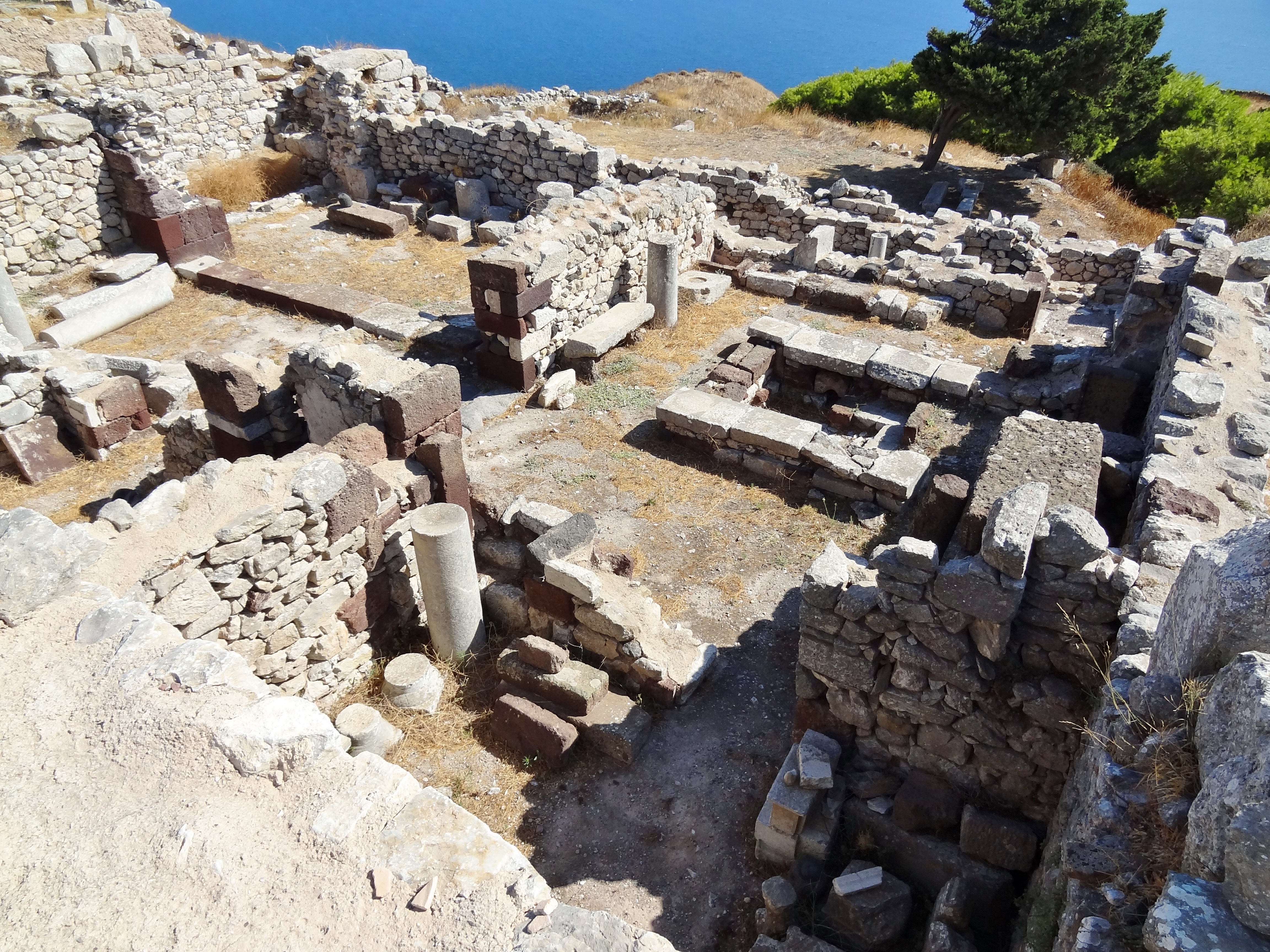 Oikia tis Tychis (‚Haus der Tyche‘) in Alt-Thera, Santorin, Kykladen, Griechenland